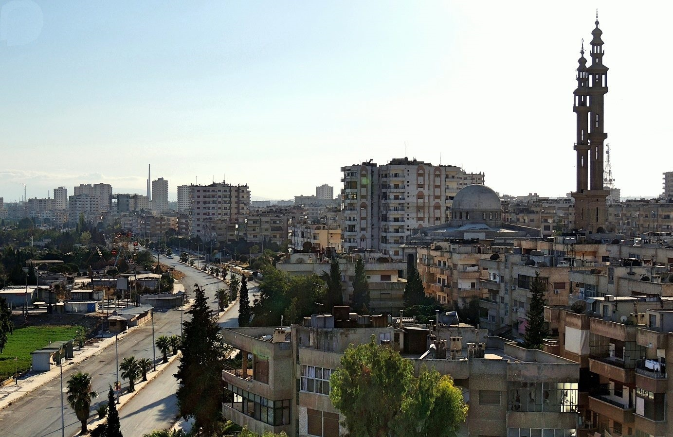 جامع الرئيس